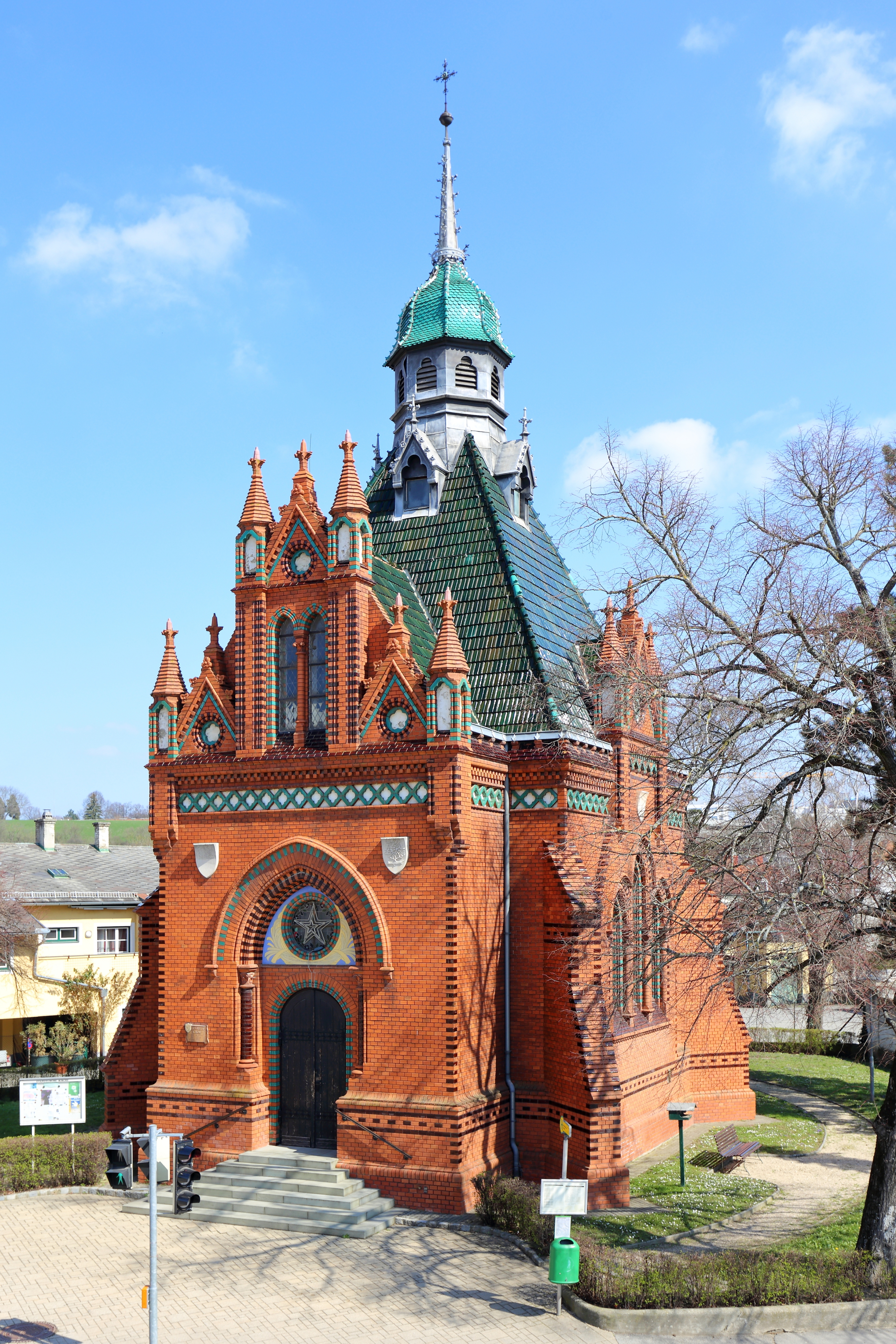 Südwestansicht der evangelischen Pfarrkirche in der niederösterreichischen Bezirkshauptstadt Mistelbach.Der hochgestreckte quaratischer Zentralbau in Formen der Backsteingotik mit bunt glasierten Ziegeln wurde von 1904 bis 1905 nach Plänen des Architekten Karl Weinbrenner erbaut.